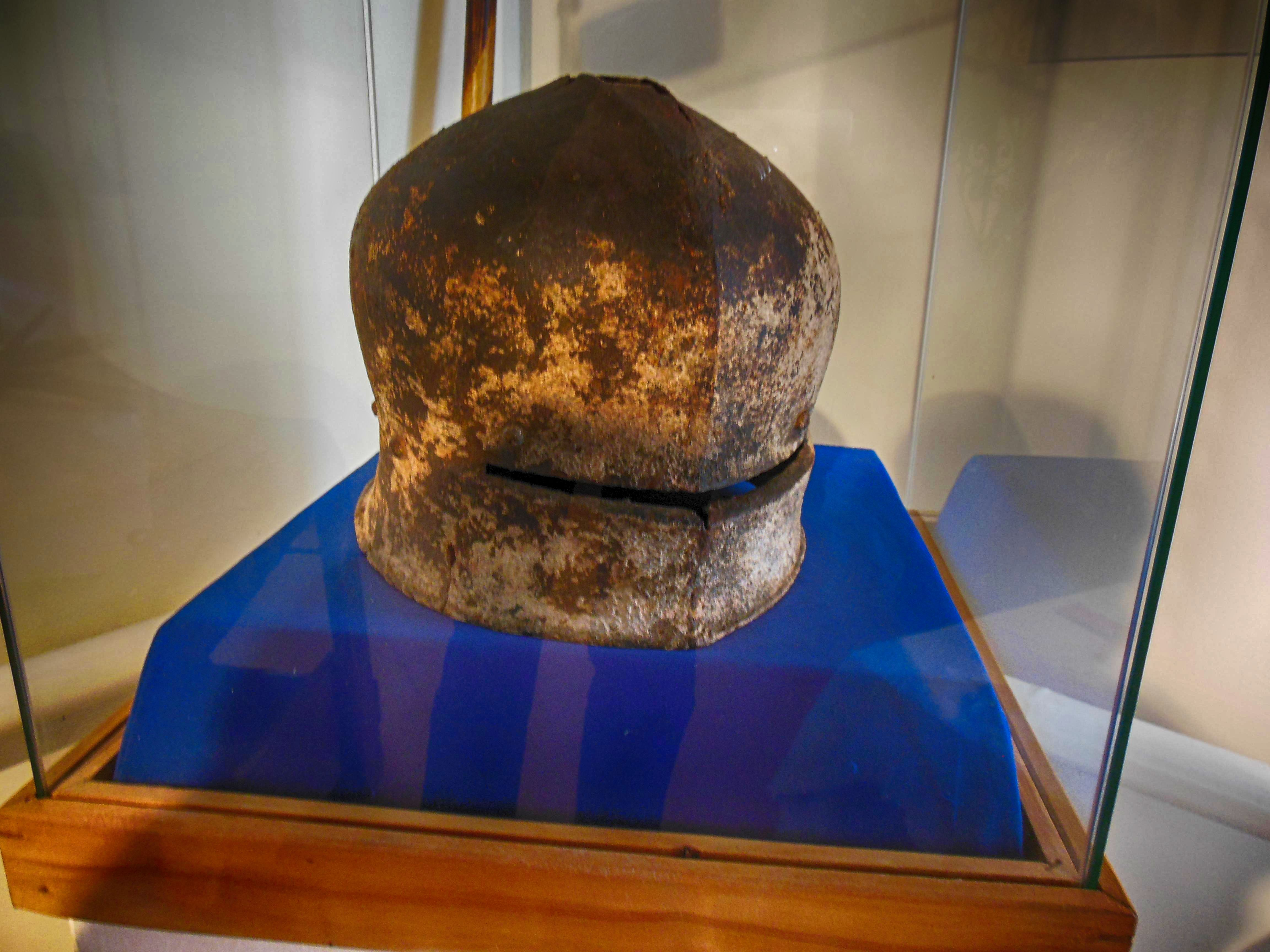 Беларуская (тарашкевіца): Мсьціслаўскі гісторыка-архэалёгічны музэй, шлем "салад" (60 - 80 гг. 15 ст.)